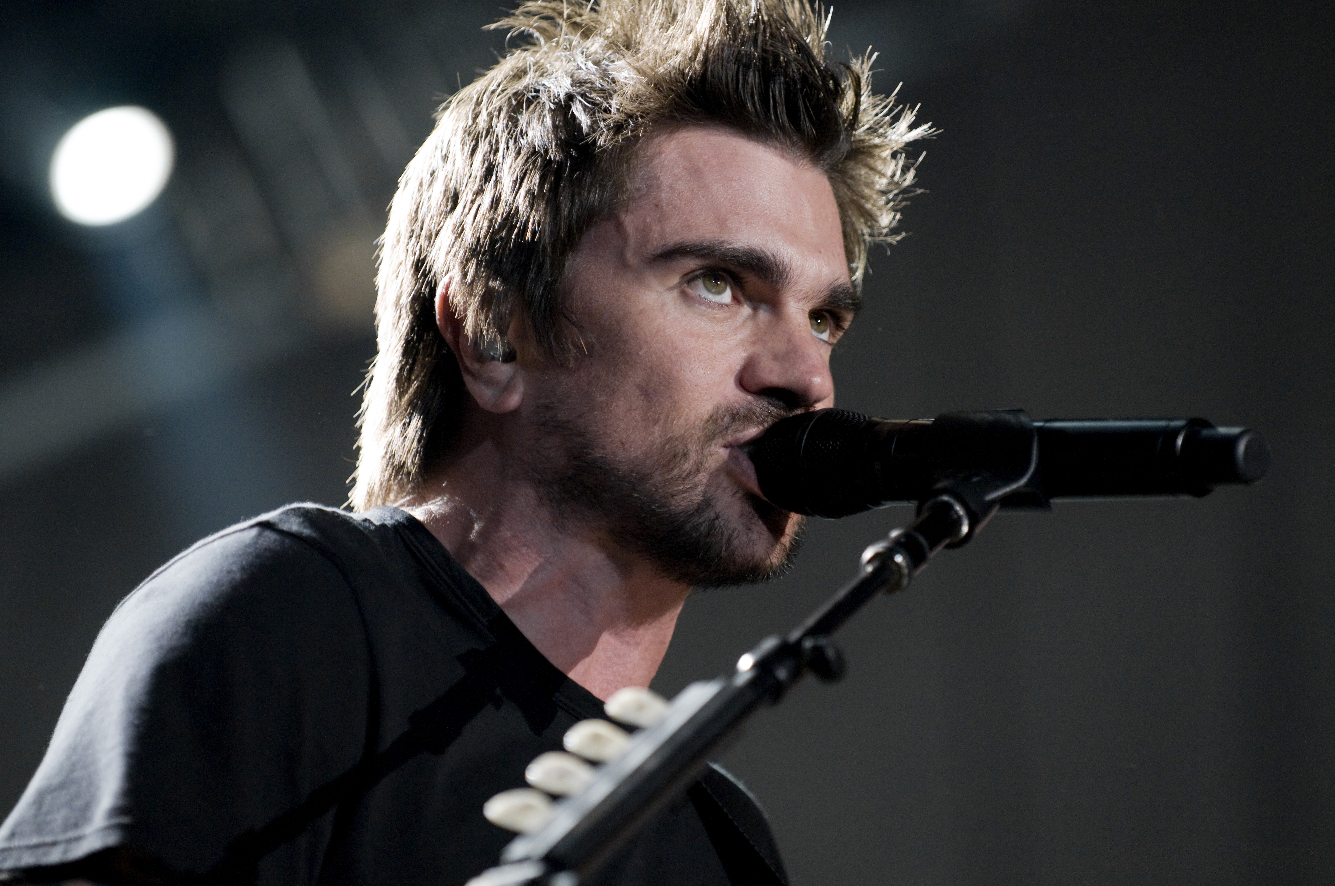 Juanes